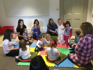 Criw Ysgol Gymraeg Llundain yn eu pyjamas!